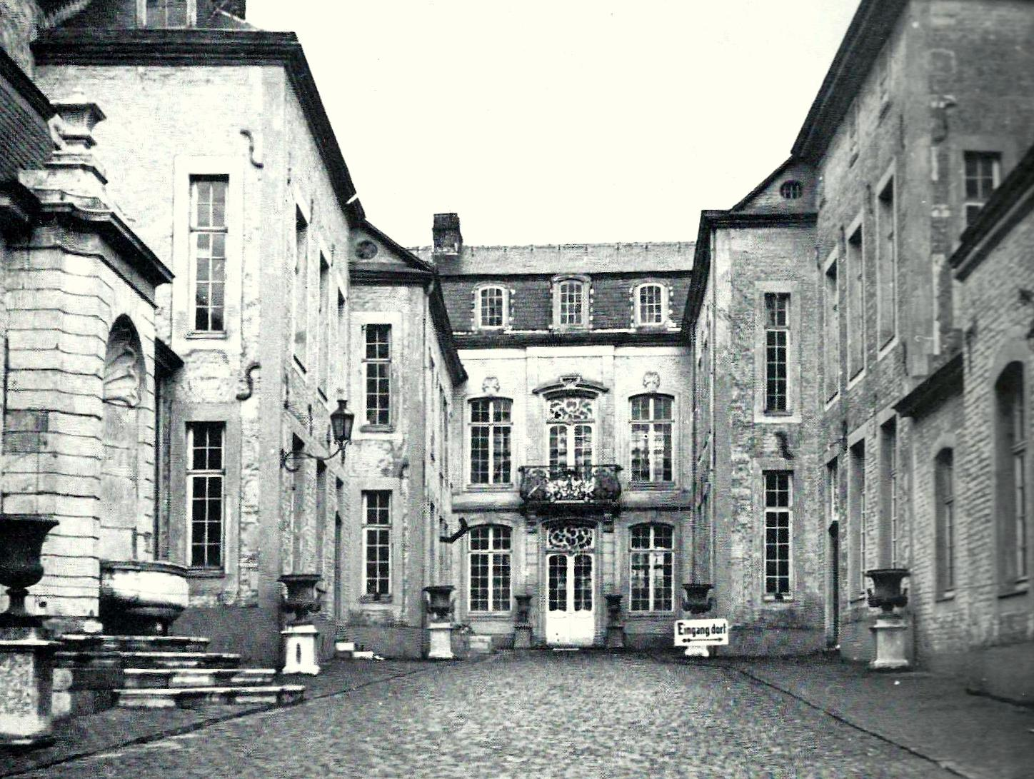 ehemaliges Haus Fey in Aachen, Sitz des ersten Couven-Museums, links der Couvenwandbrunnen, heute am Marienhospital in Aachen-Burtscheid